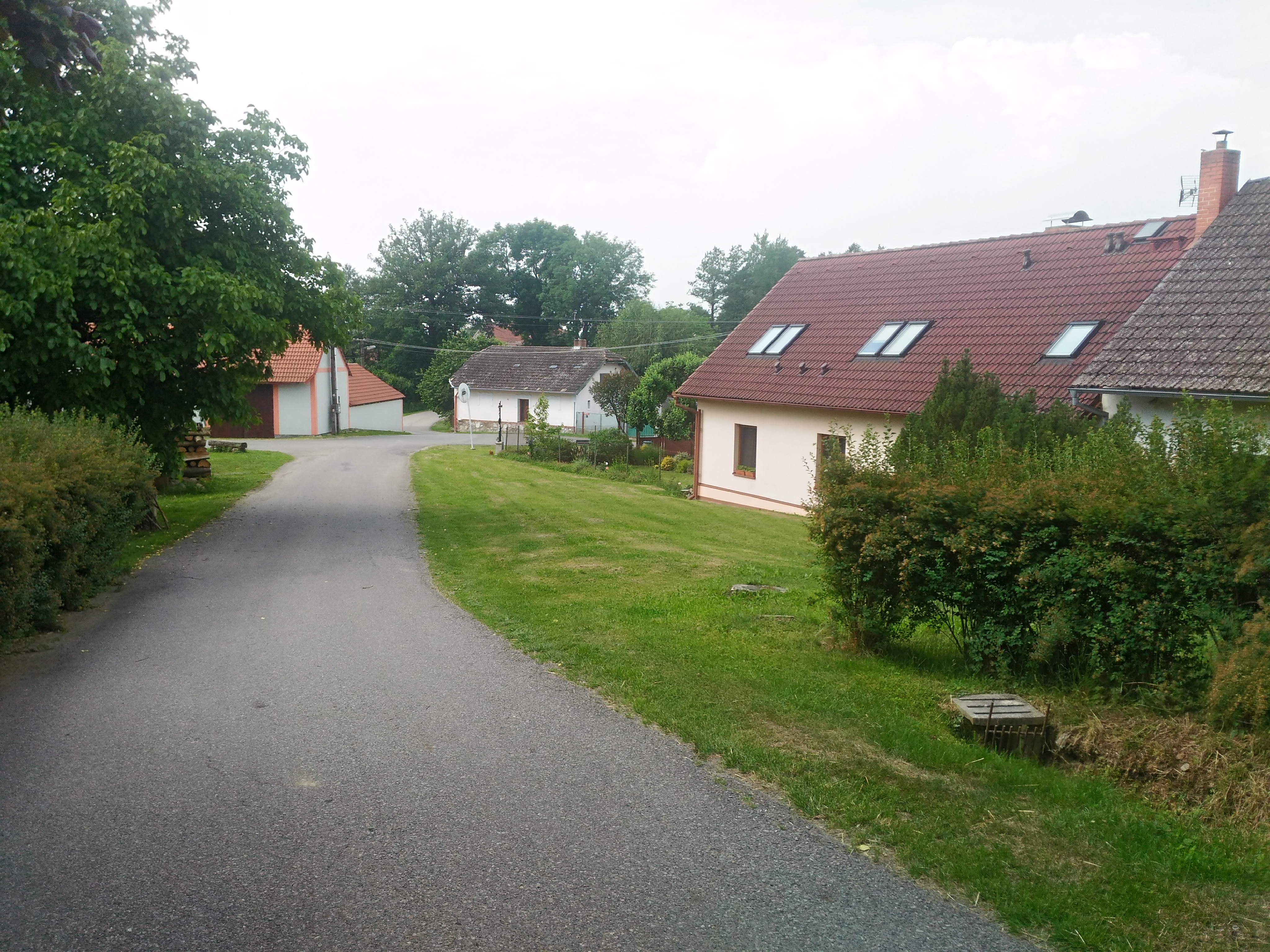 Nasavrky, okres Tábor, Česká republika